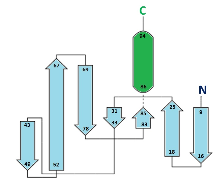 En la imagen se muestra la estructura secundaria de la proteasa; en la cual se pueden observar el carbono terminal y el amino terminal